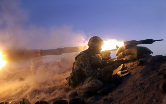 MILAN im Einsatz. Weltweit in über 40 Nationen verwendet